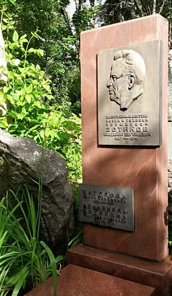 Памятник Зотикову Владимиру Евгеньевичу (1887-1970) на Новодевичьем кладбище в Москве.